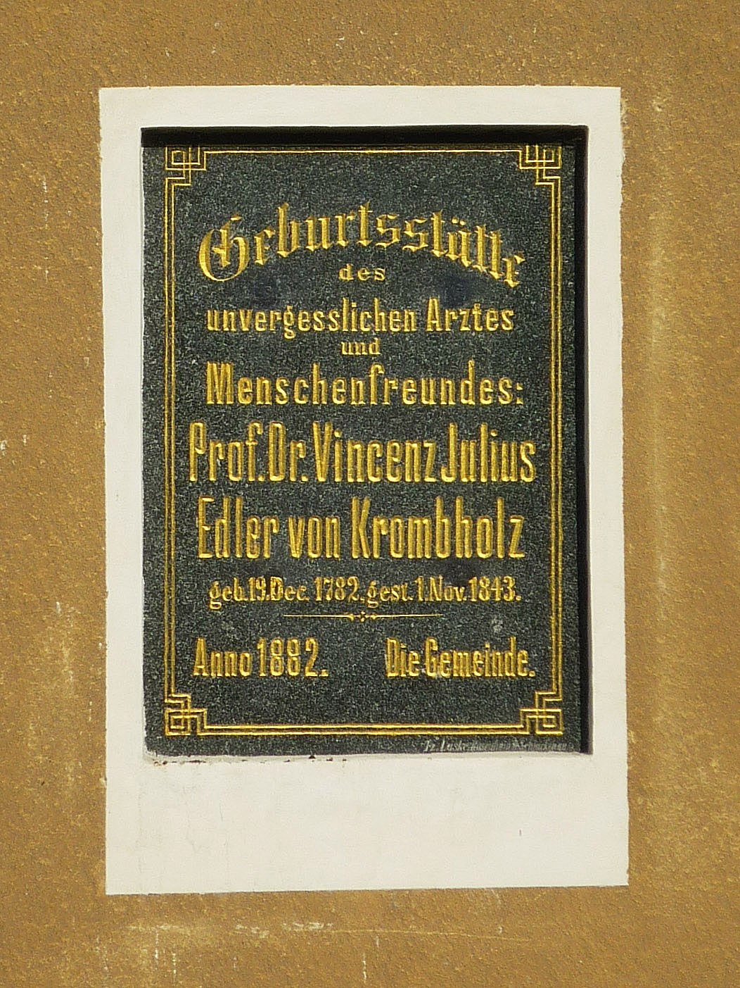 Pamětní deska Vincenci Juliovi Kromholzovi, Horní Police, náměstí Odboje čp. 6.